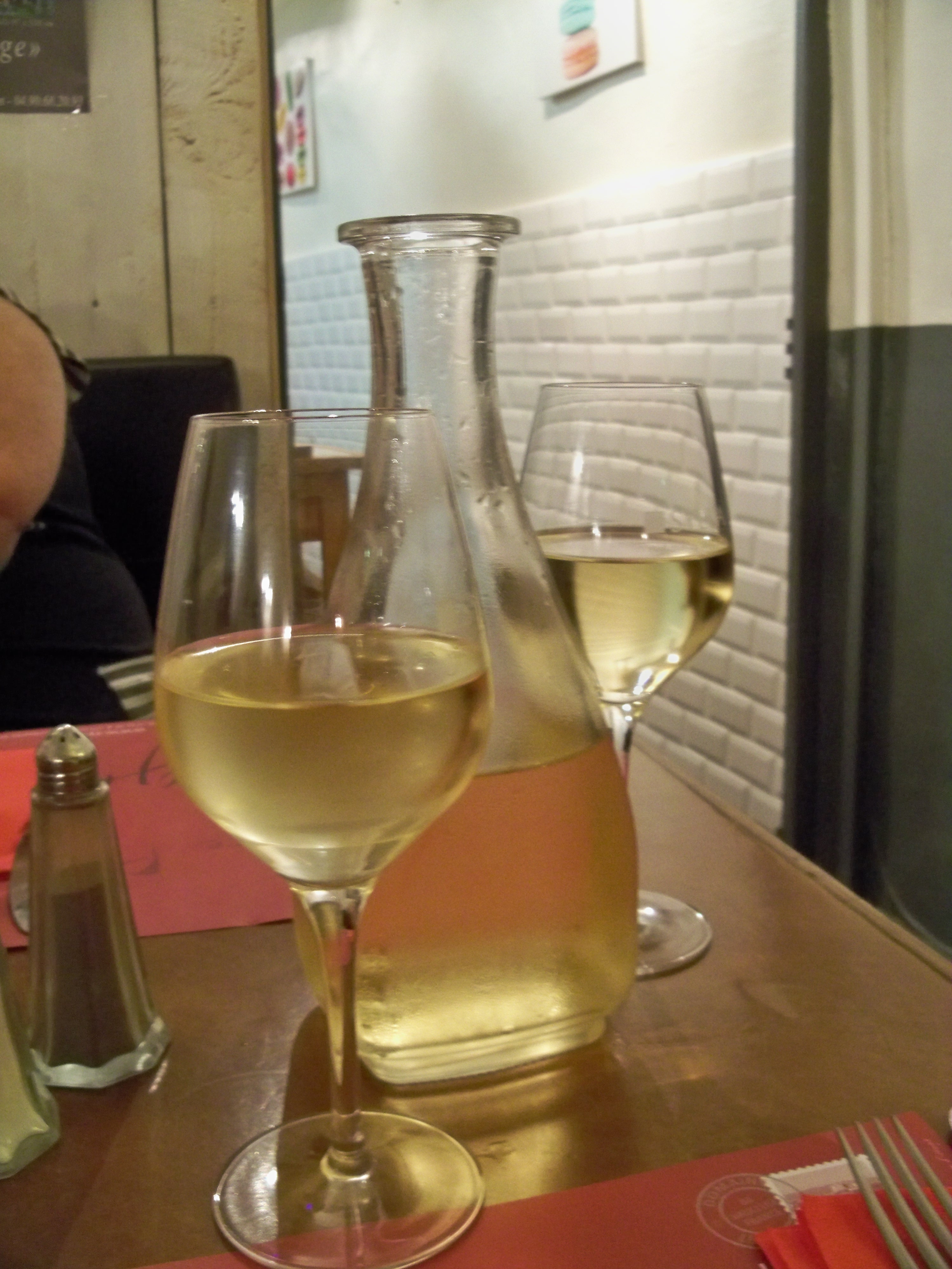 carafe d'IGP Val-de-loire blanc